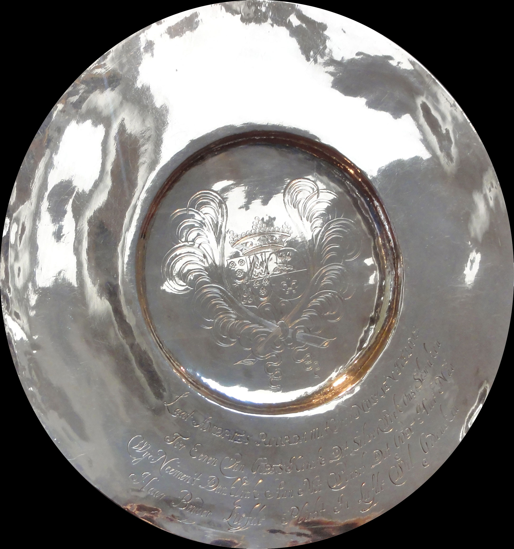 Sint Pieterkerk van Grou (avondmaalsschaal)